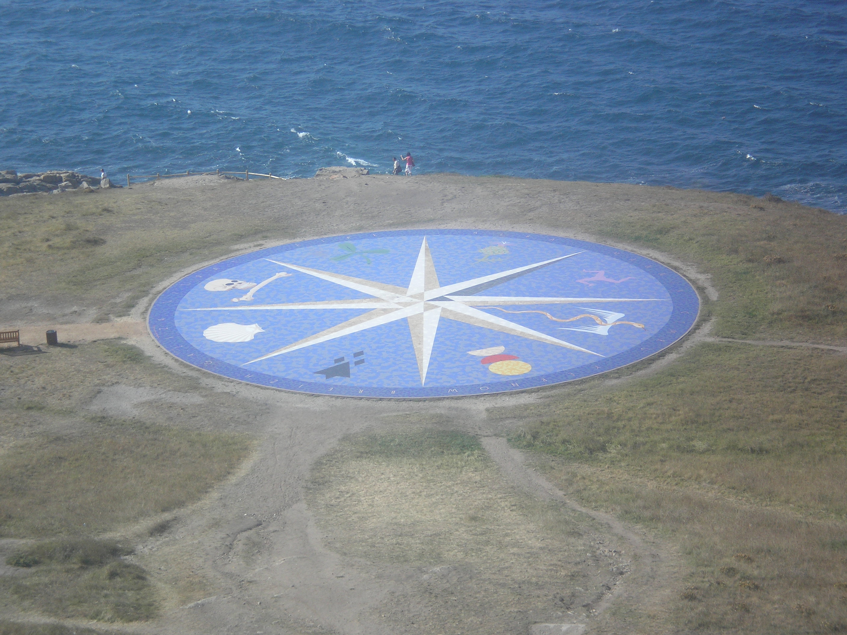 La Rosa de los vientos que está al lado de la Torre de Hércules, en La Coruña, Galicia, España.